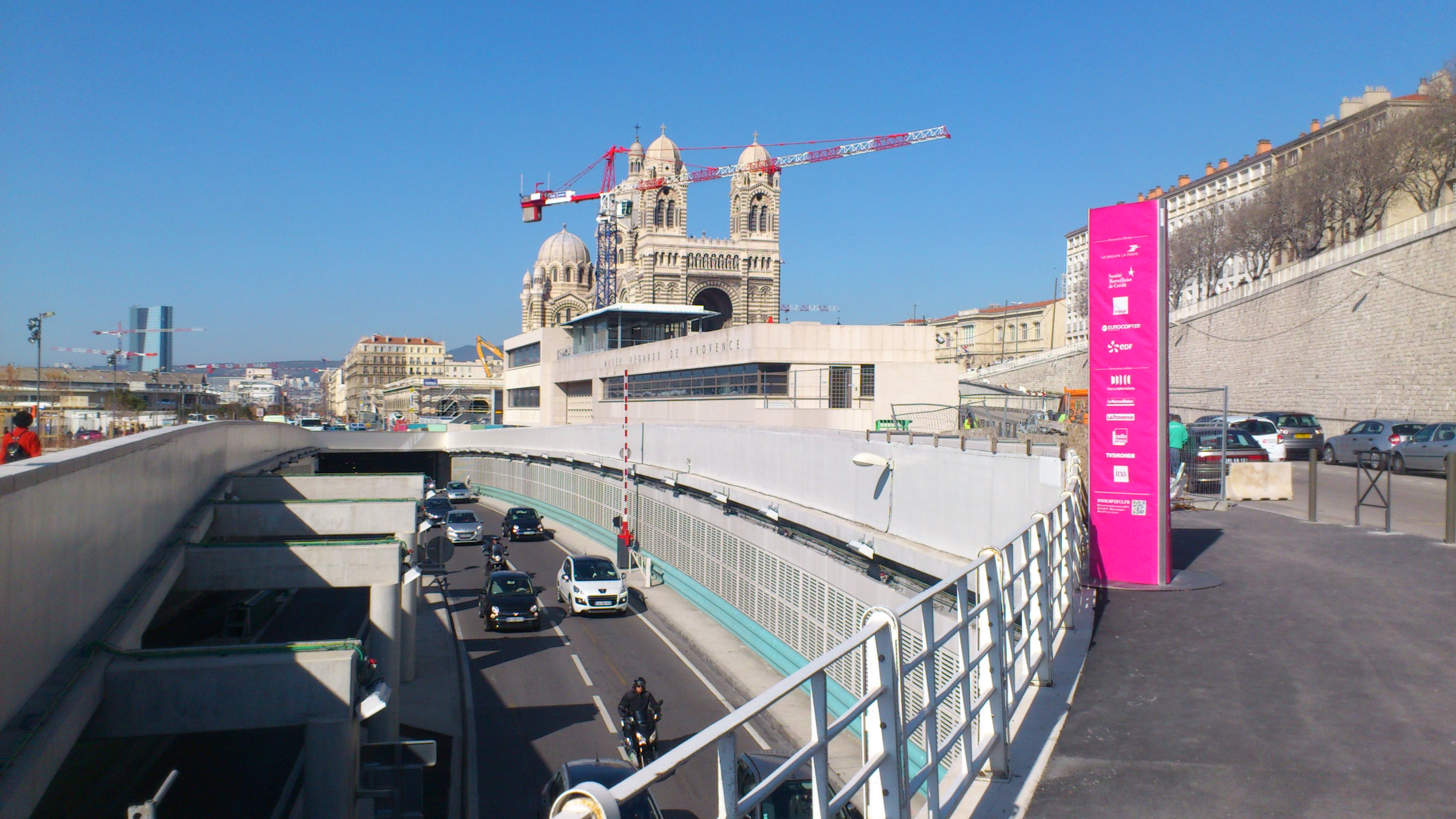 musée de la fondation, Marseille mars 2013, mp2013 Marsella museum